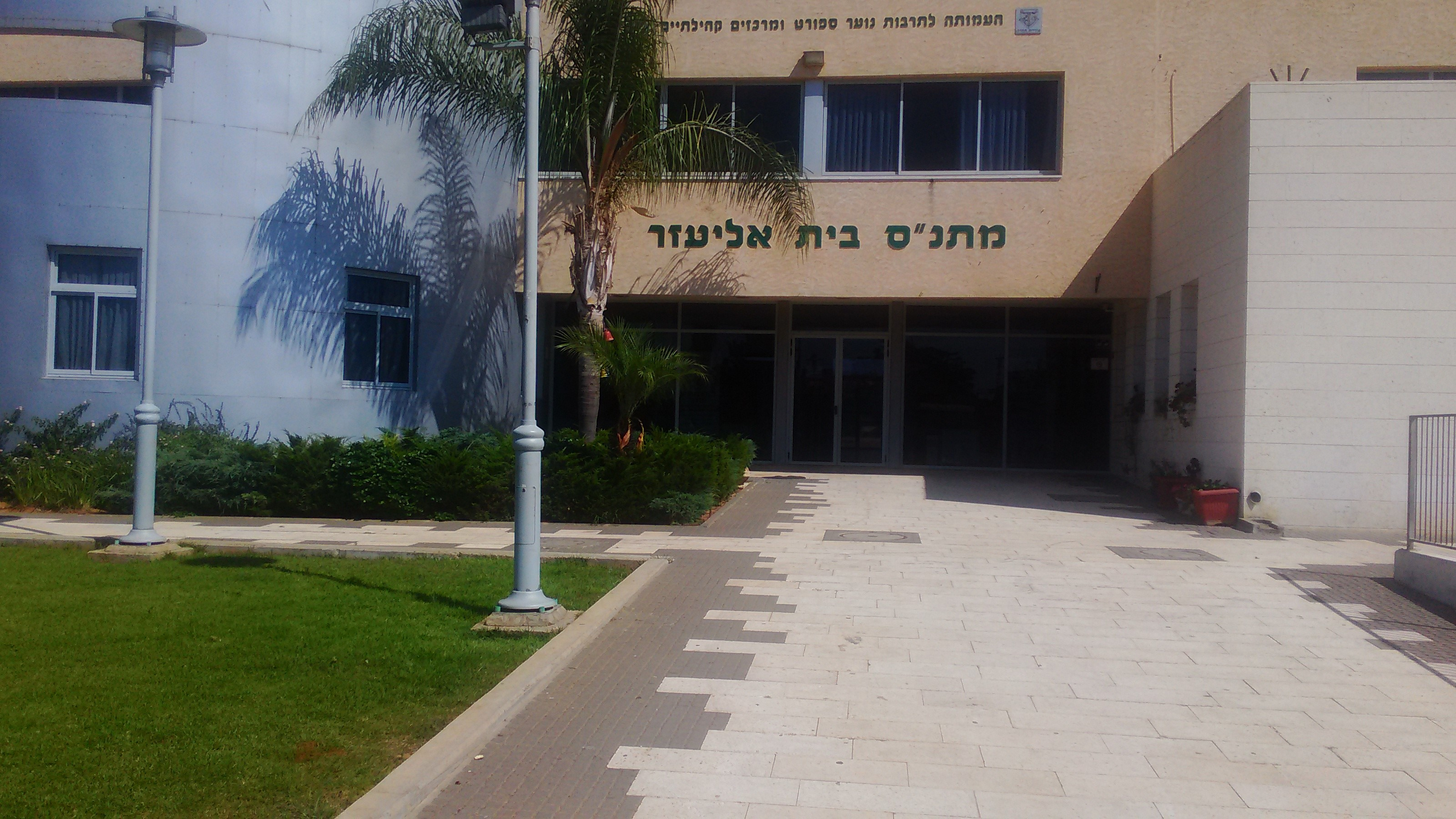 מתנ"ס בית אליעזר